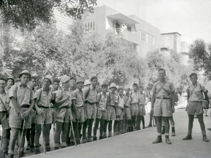 גנד"ע